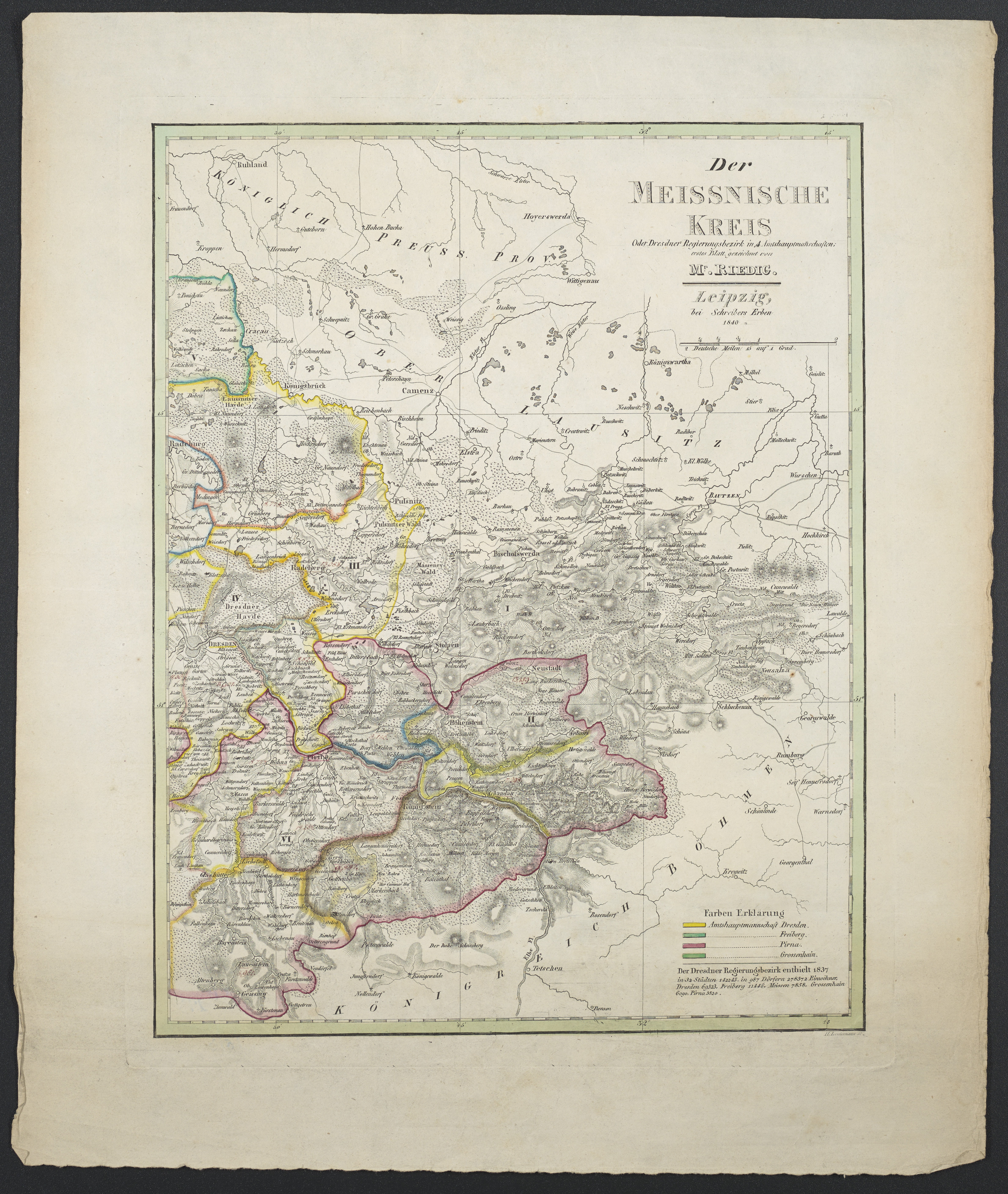 1 Kt. auf 2 Bl. : Grenzen kolor. (Gesamtgr. 57 x 35 cm, je Teil 27 x 36 cm); Koordinaten E 12°48'00"-E 13°46'00"/N 51°29'00"-N 50°45'00"; Maßstab in graph. Form (Deutsche Meilen). - Titel und Maßstab oben rechts (HK 493). - Erkl. der Farben unten rechts (HK 493) und unten Mitte (HK 494). - Relief: Schraffen. - Anordnung der Kt.: HK 494 links, HK 493 rechts